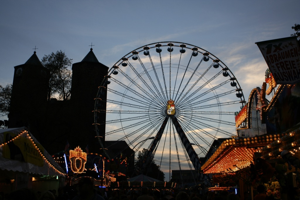 Das Riesenrad beim Memminger Jahrmarkt. Im Hintergrund die Kirche St. Josef